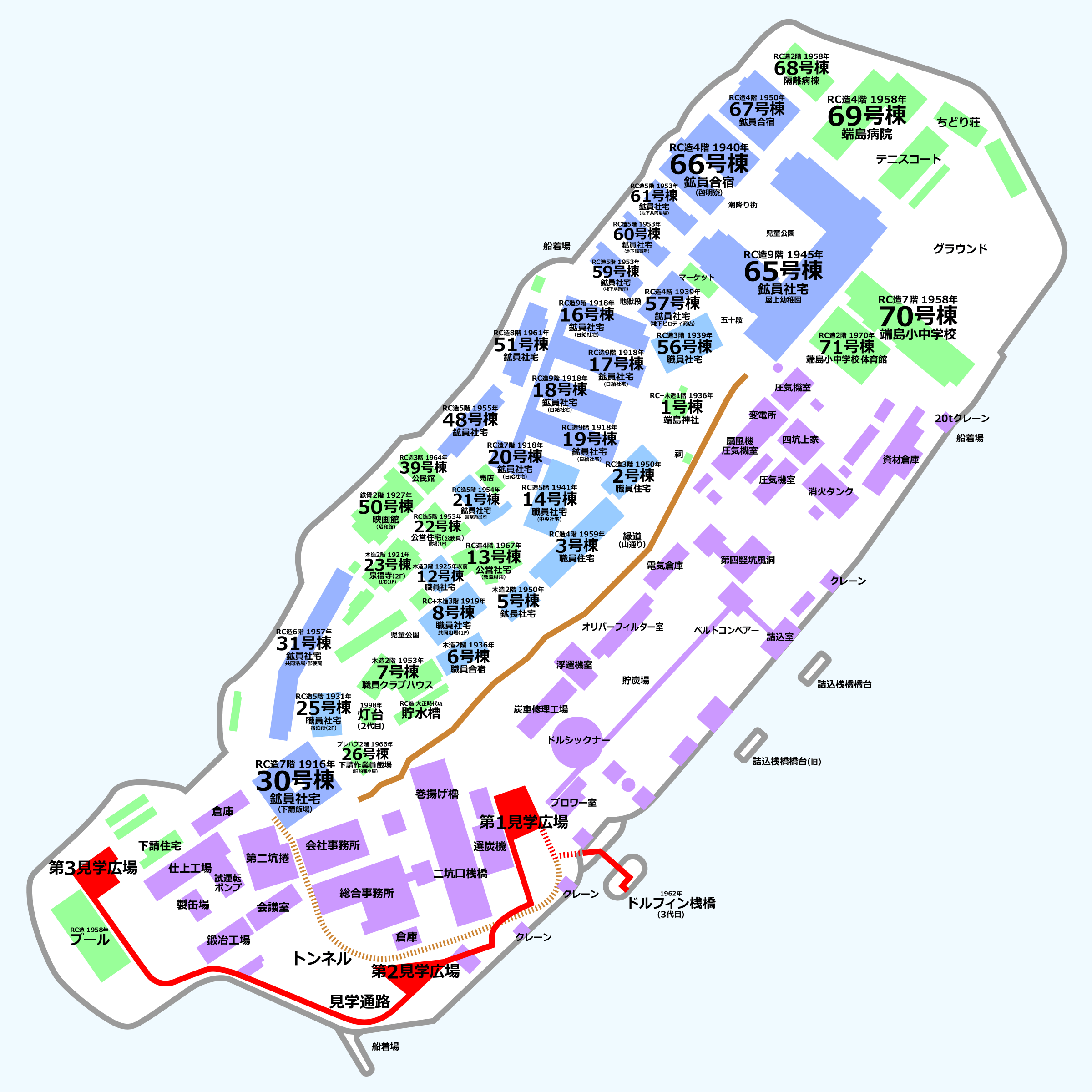 端島(軍艦島)の地図。閉山時のものに現在の見学施設・灯台などを追加したもの。破壊された/倒壊した建物も含む。